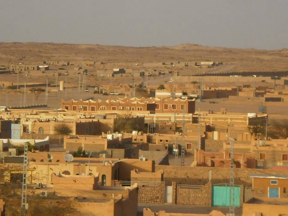 vu sur la montagne tinzaouaten